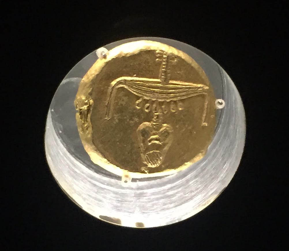 מטבע שטבע הפרעה נקטנבו השני, המטבע הפרעוני היחידי שקיים